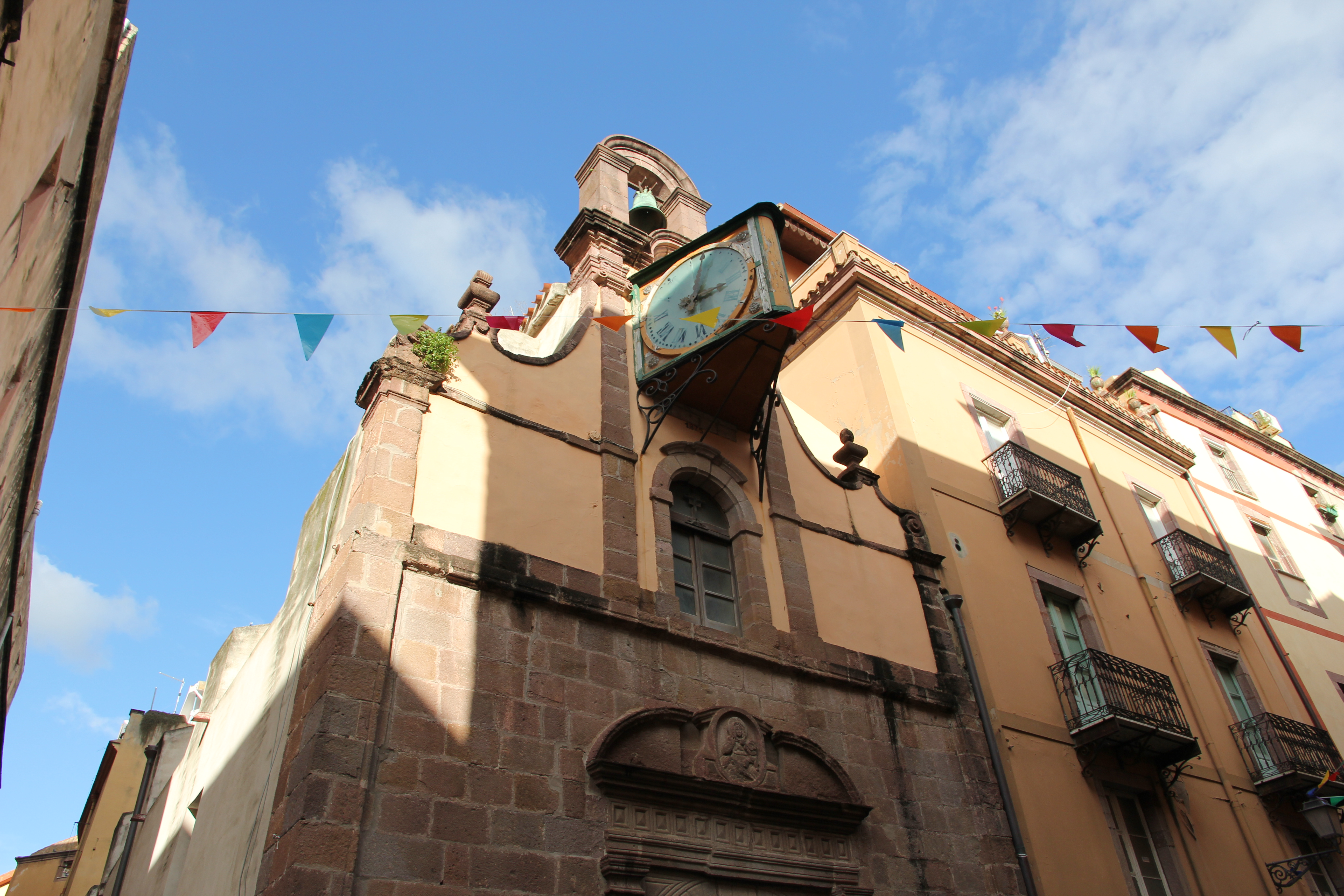 Bosa - Chiesa della Madonna del Rosario m 16 s.l.m.